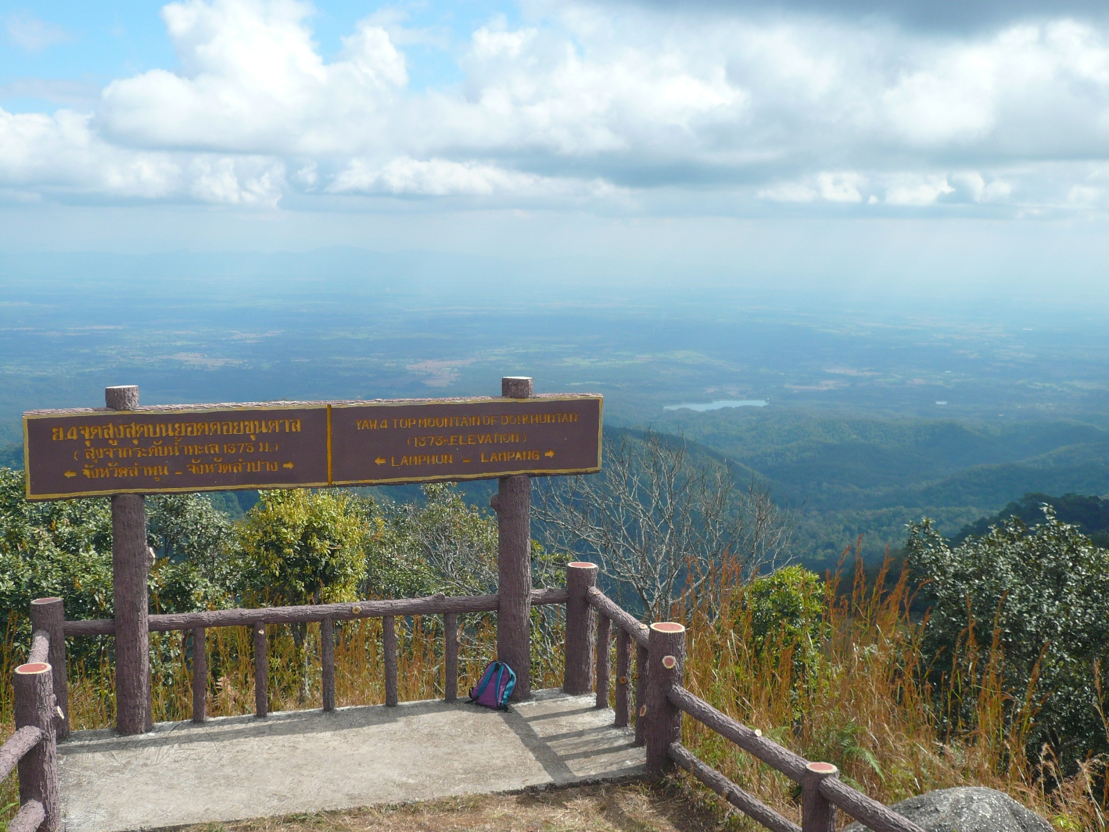 Doi Khun Tan peak, Thailand